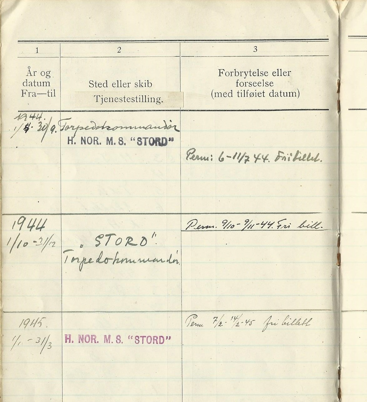 Service book Royal Norwegian Navy